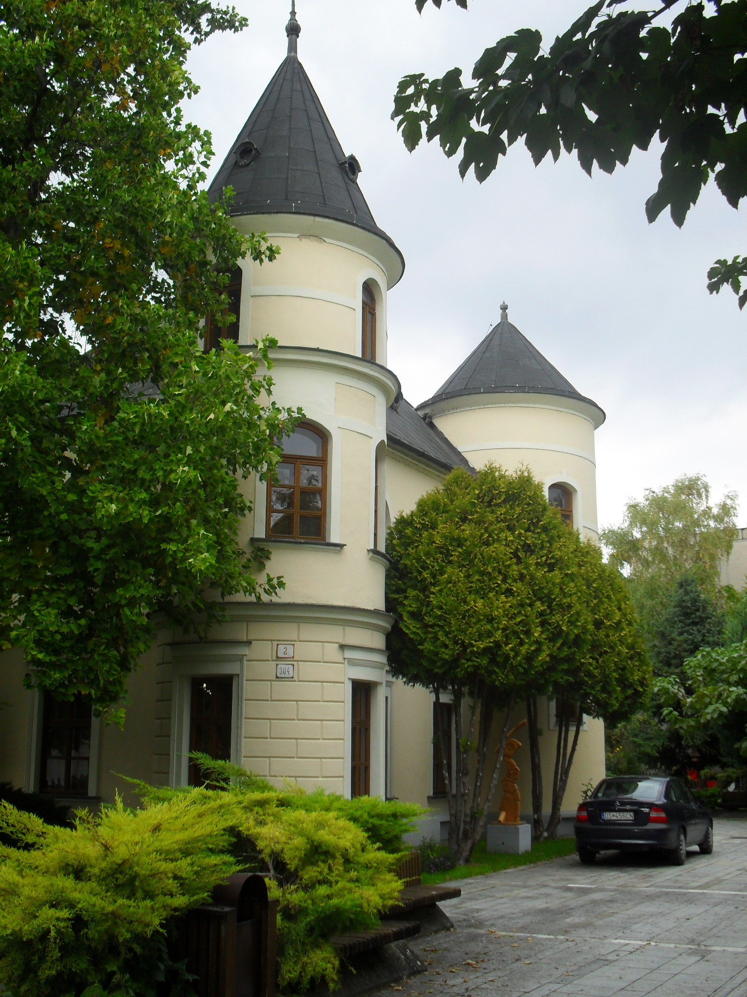 Dunaszerdahely - Kortárs Magyar Galéria